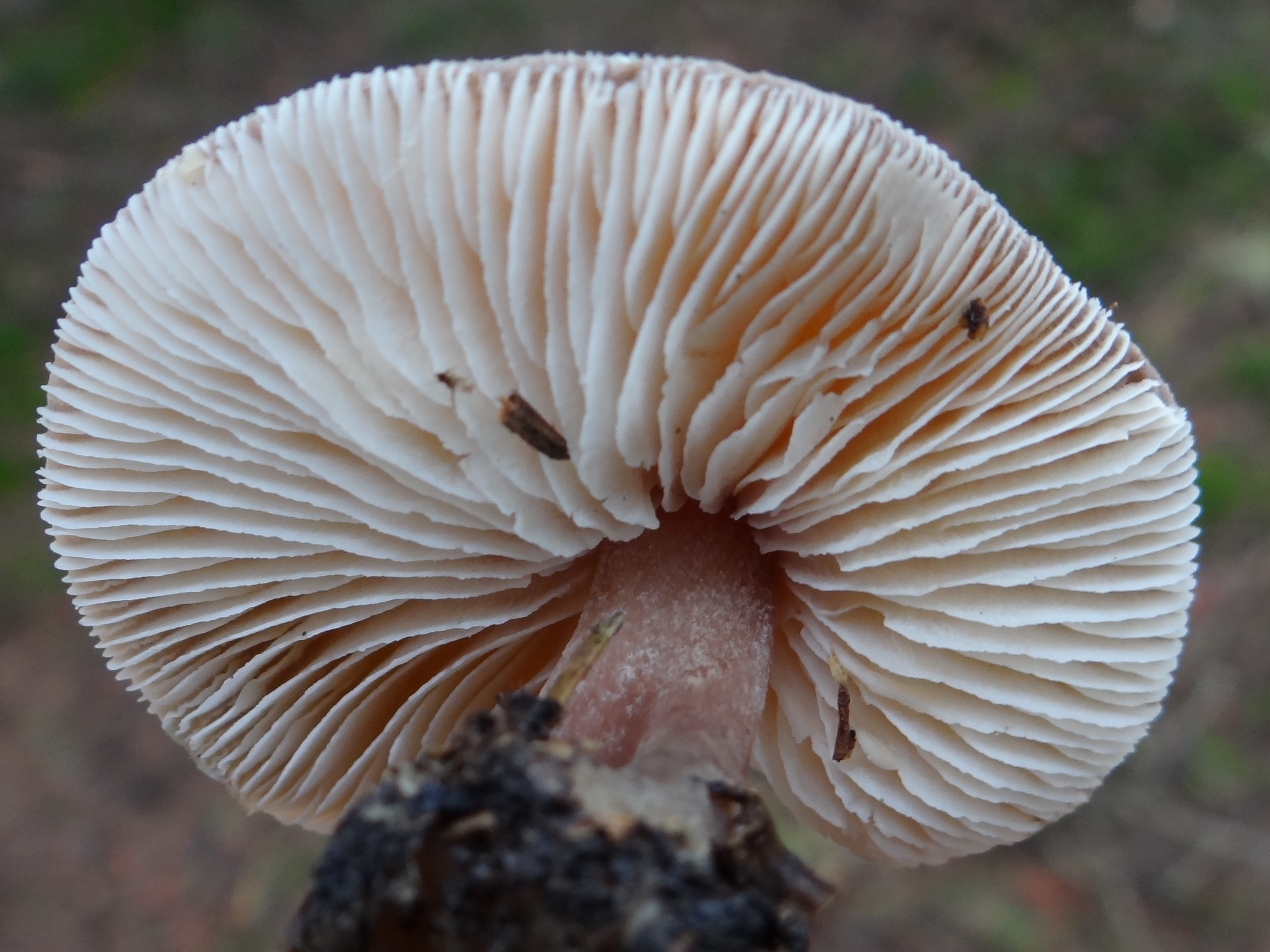 Rhodcollybia butyracea (location: Poland, Kamionna (województwo małopolskie)